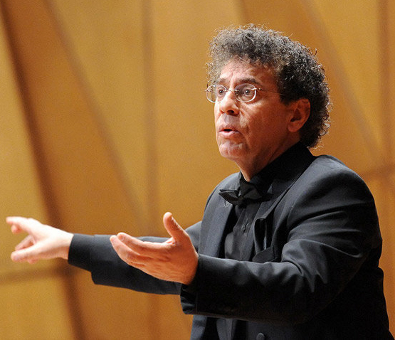 اجرای کر ارکستر سمفونیک تهران به رهبری رازمیک اوهانیان تالار رودکی تهران ۳۰ بهمن ۱۳۹۴